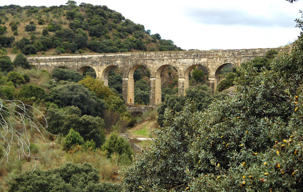 Puente-acueducto de La Retuerta